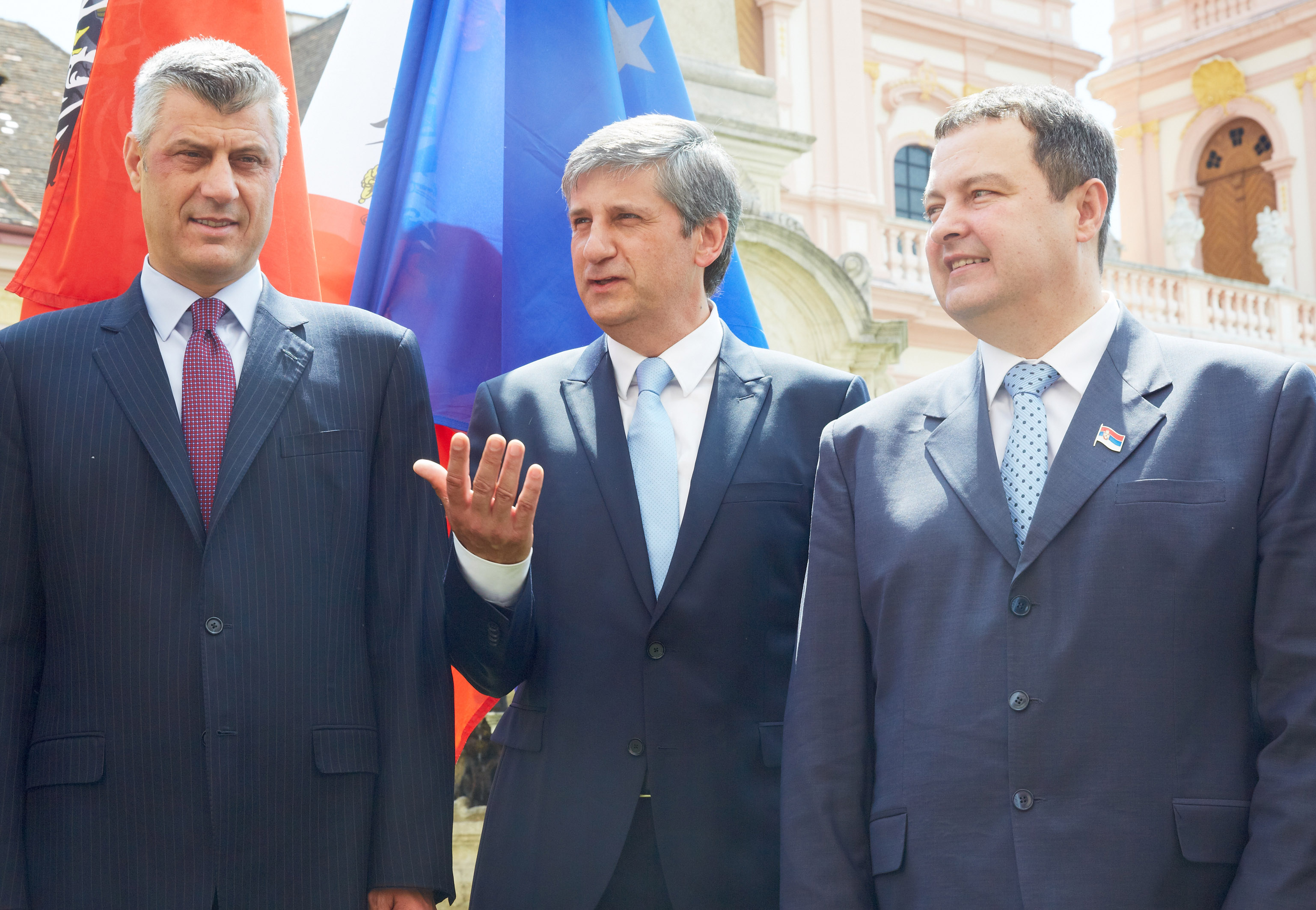 Wien 16.06.2013 - Aussenminister Spindelegger (ÃVP) nahm heute am 18. Europa-Forums Wachau, im Stift Göttweig teil das heuer 'Jenseits der Krise - Umrisse eines neuen Europas' zum Thema hatte PHOTO: Aussenminister Michael Spindelegger (M) zusammen mit Hashim Thaci (L), dem Premierminister des Kosovo und Ivica Dacic (R), Ministerpräsident von Serbien